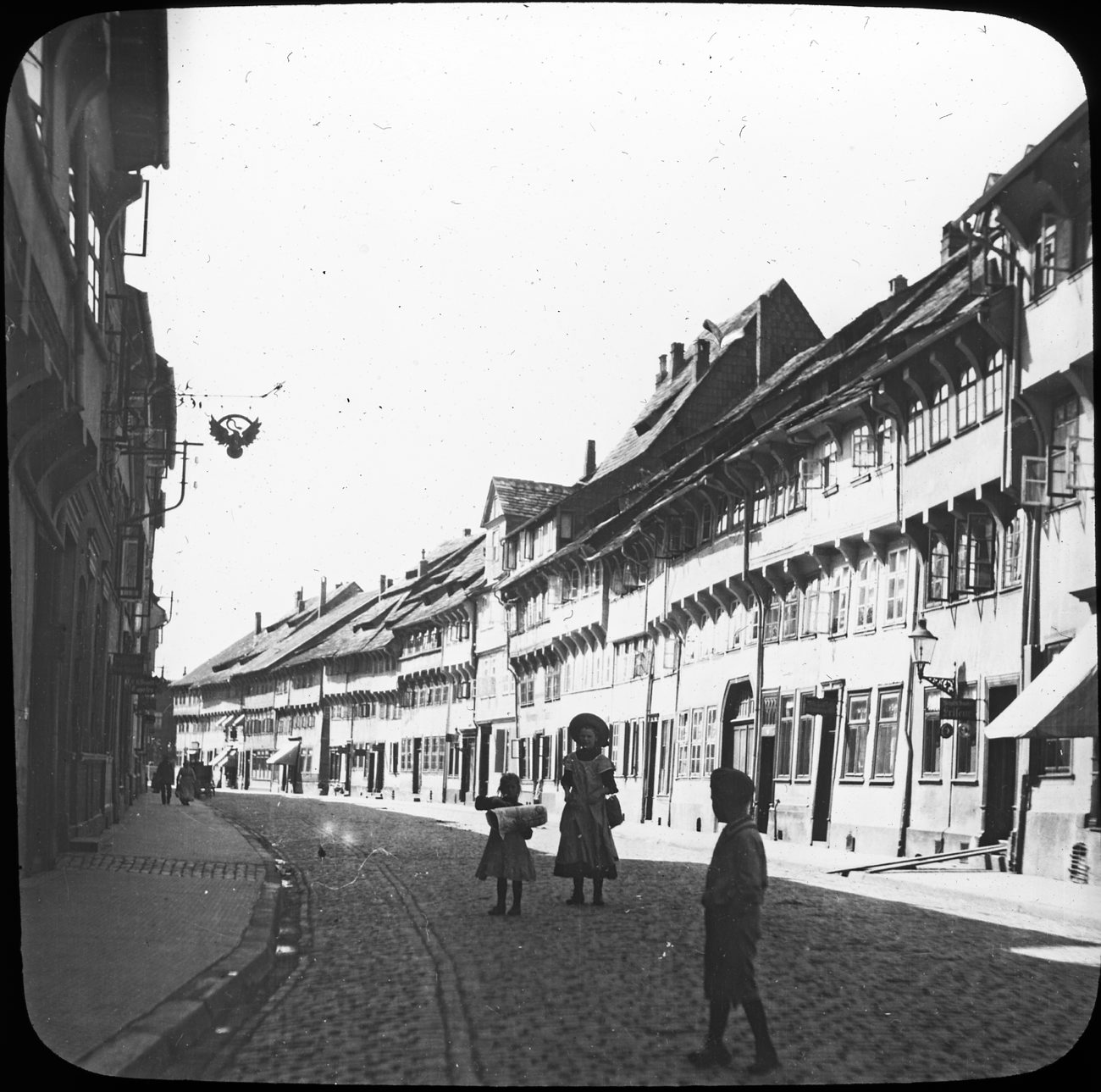 SKC2624 Einbeck, 1909. Photo: Sigurd Curman